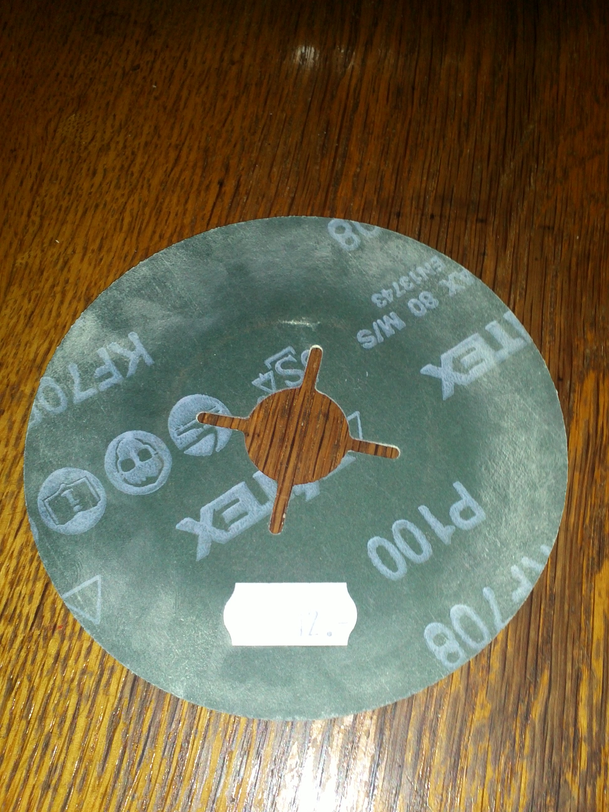 Brusný kotouč.